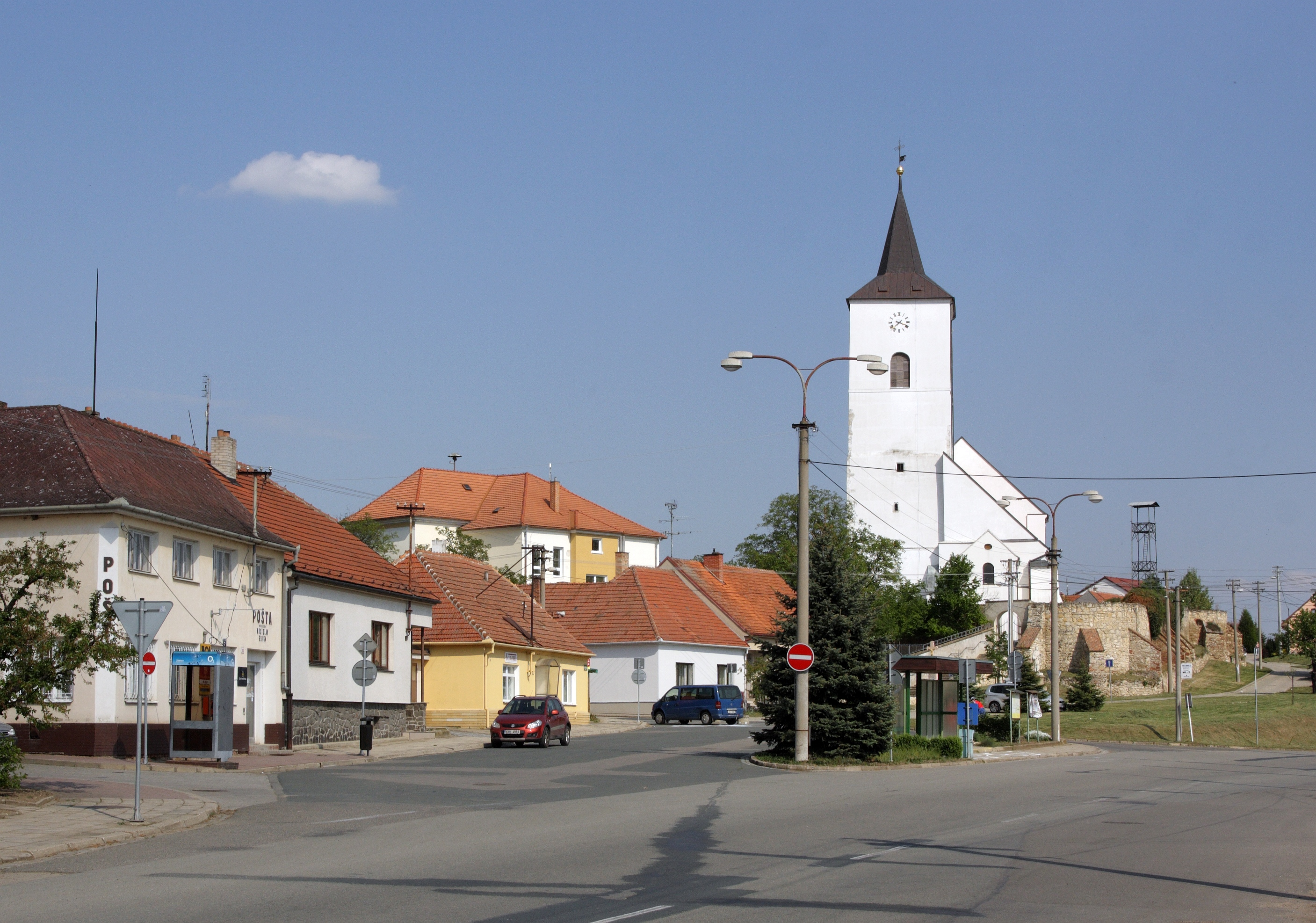 Nosislav - náves.